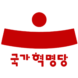 국가혁명당 로고